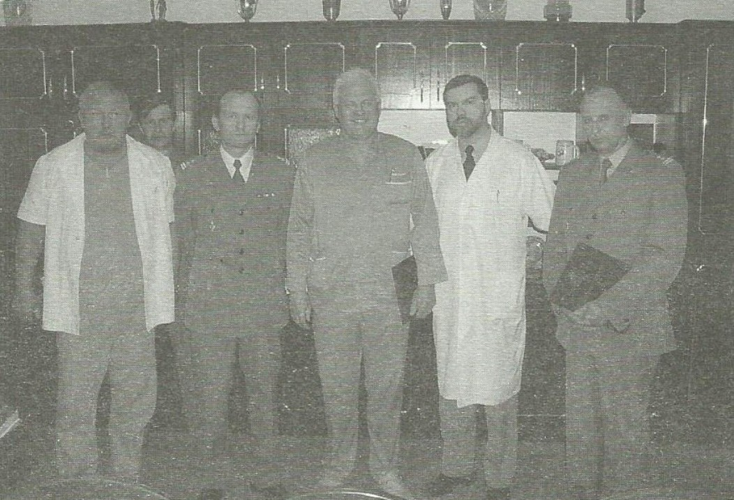 Szczecin, 2002 r., 109 Szpital Wojskowy, pożegnanie wojskowych lekarzy do rezerwy